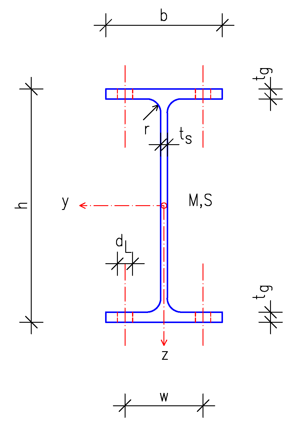 Stahlprofil IPE